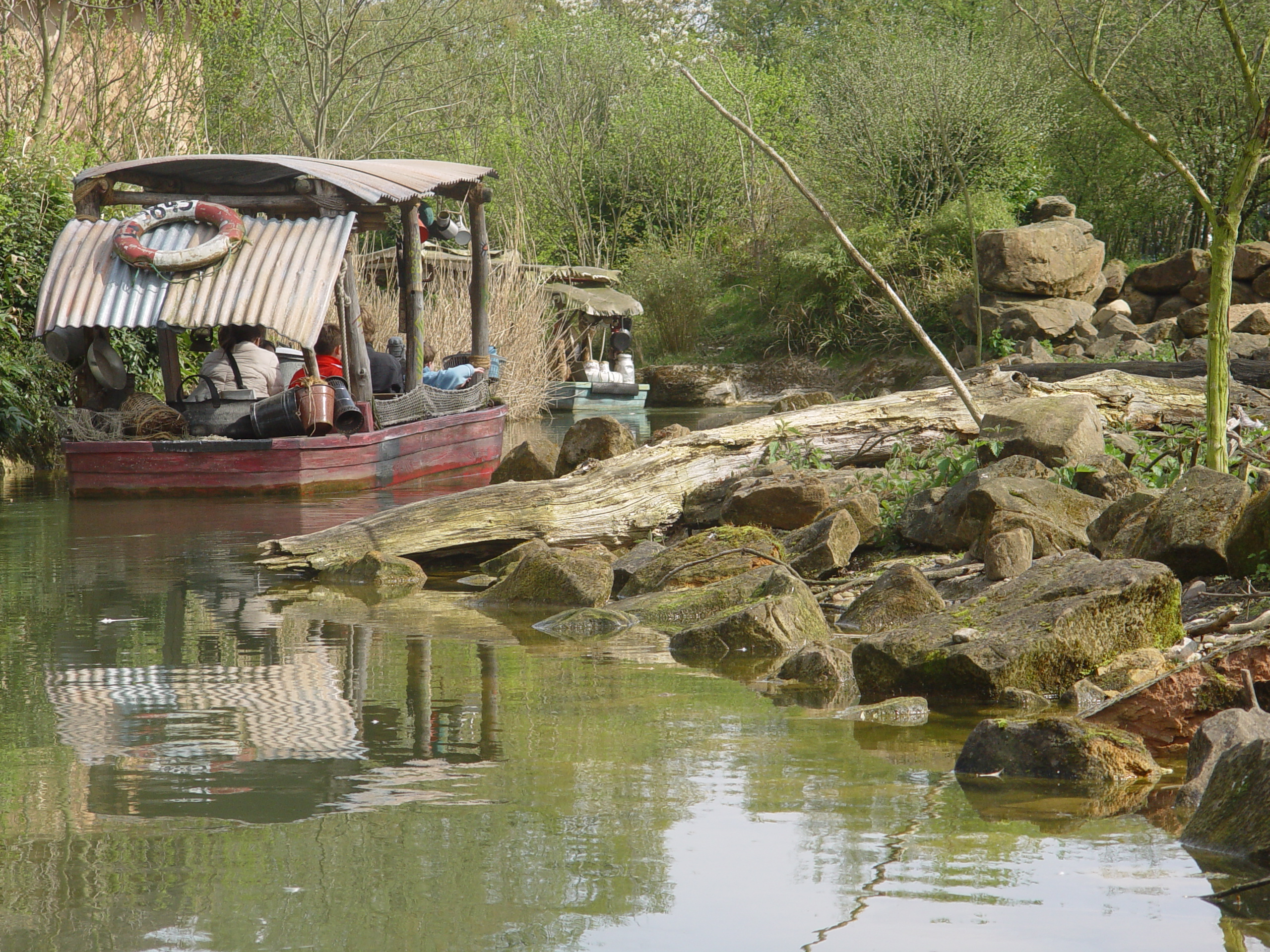 Bootfahrt im Zoo Hannover an den Tieranlagen vorbei.